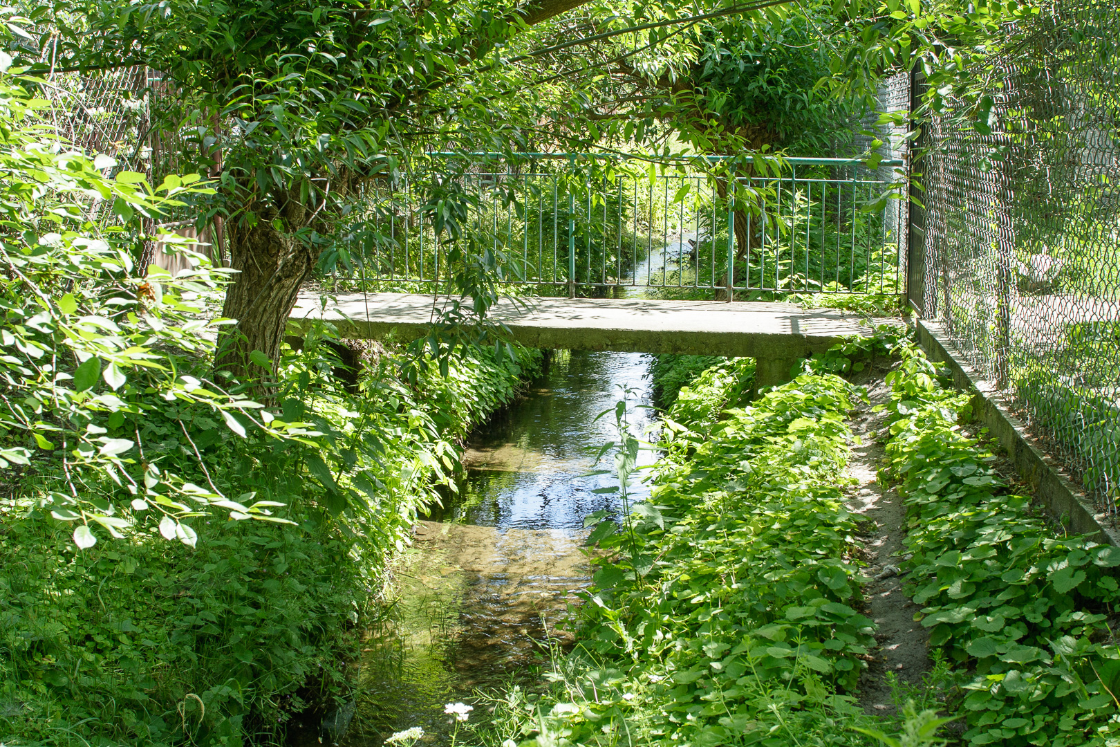 Mostek na Kanale Wawerskim pomiędzy ulicami Koryncką i Sadulską. Wawer, Warszawa.